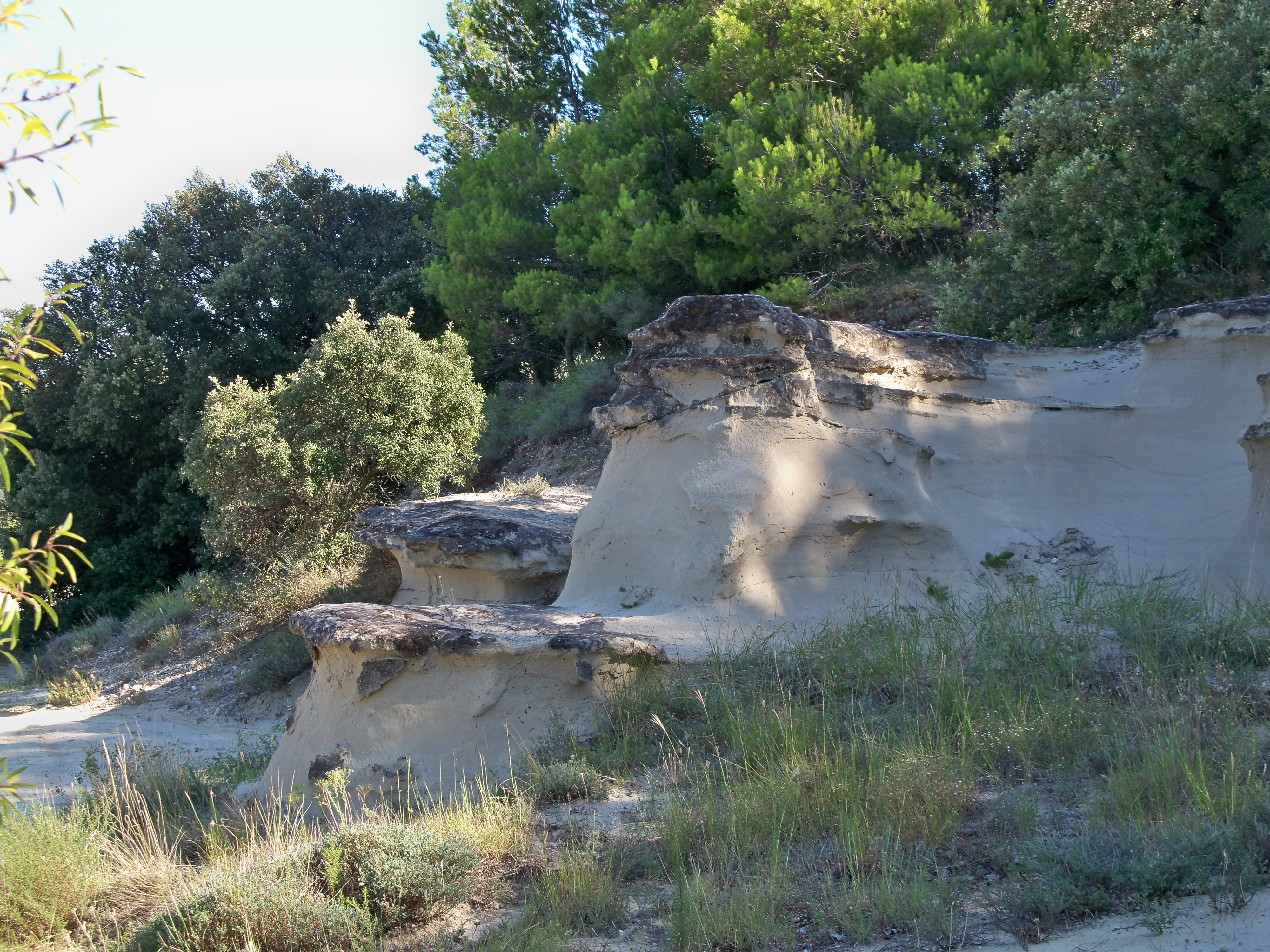 Strate de terrain près de Vacqueyras (84)